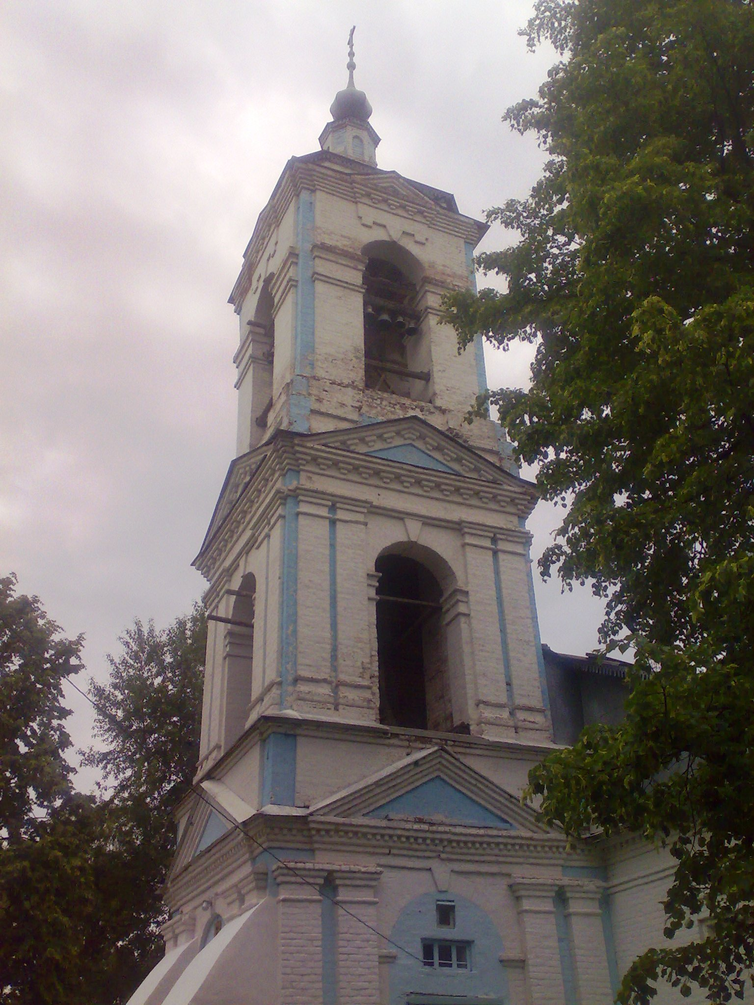 Фото церкви в селе Жарки Юрьевецкого района Ивановской области